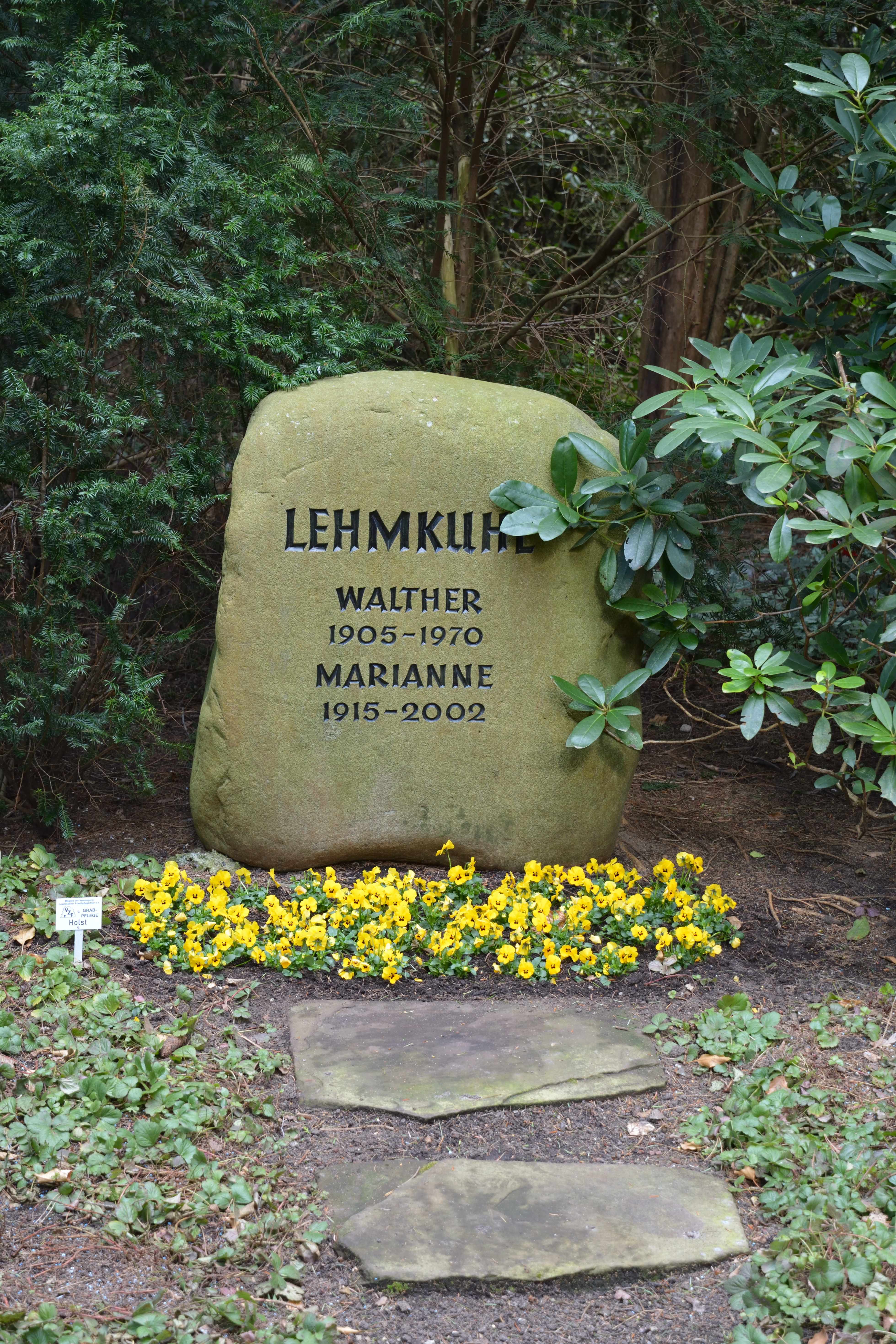 Bilder vom Südfriedhof Neumünster Grab von Walther Lehmkuhl